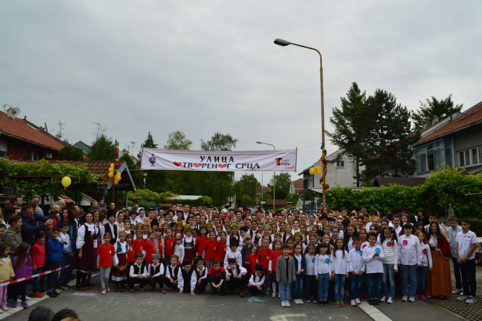 Ulica otvorenog srca